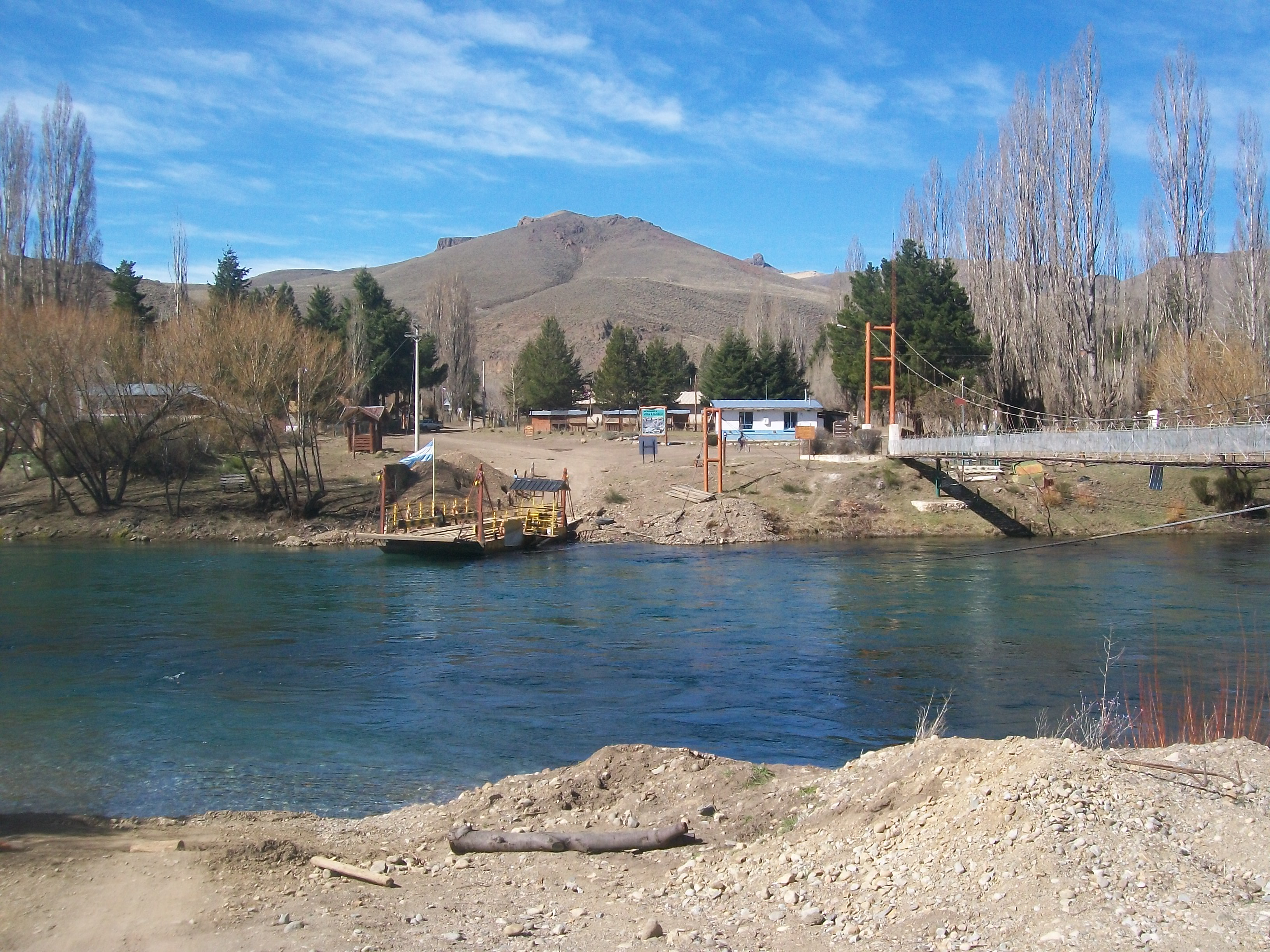 Villa Llanquin, provincia de Río Negro, Argentina. Vista de la pasarela colgante sobre el río Limay y la balsa para cruce de vehículos